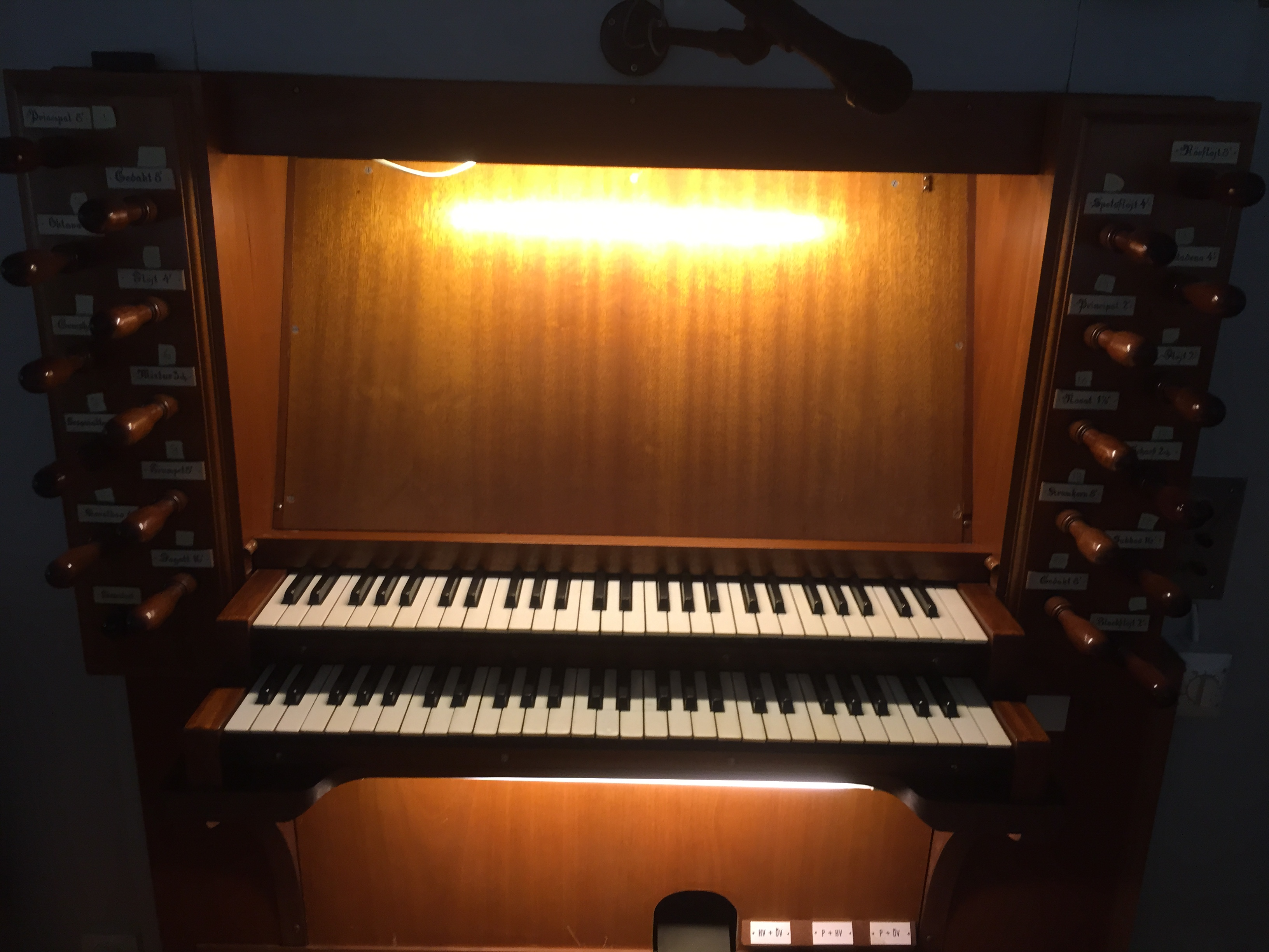 Gärdslösa kyrka, Öland. Läktarorgelns spelbord.